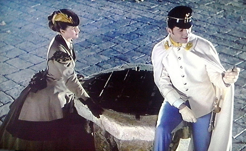 Alida Valli e Farley Granger in "Senso" - 1954